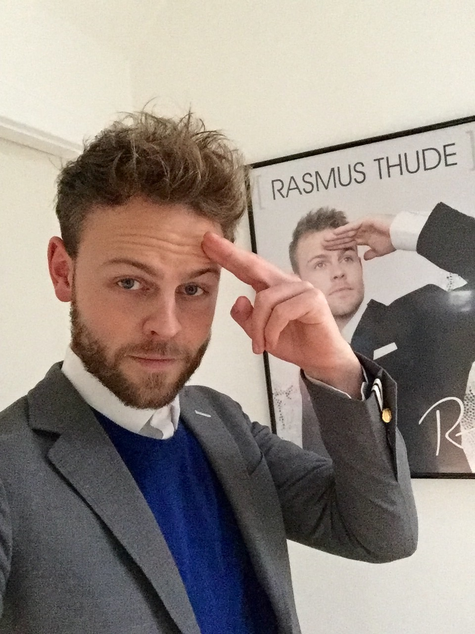 Rasmus Thude i 2015